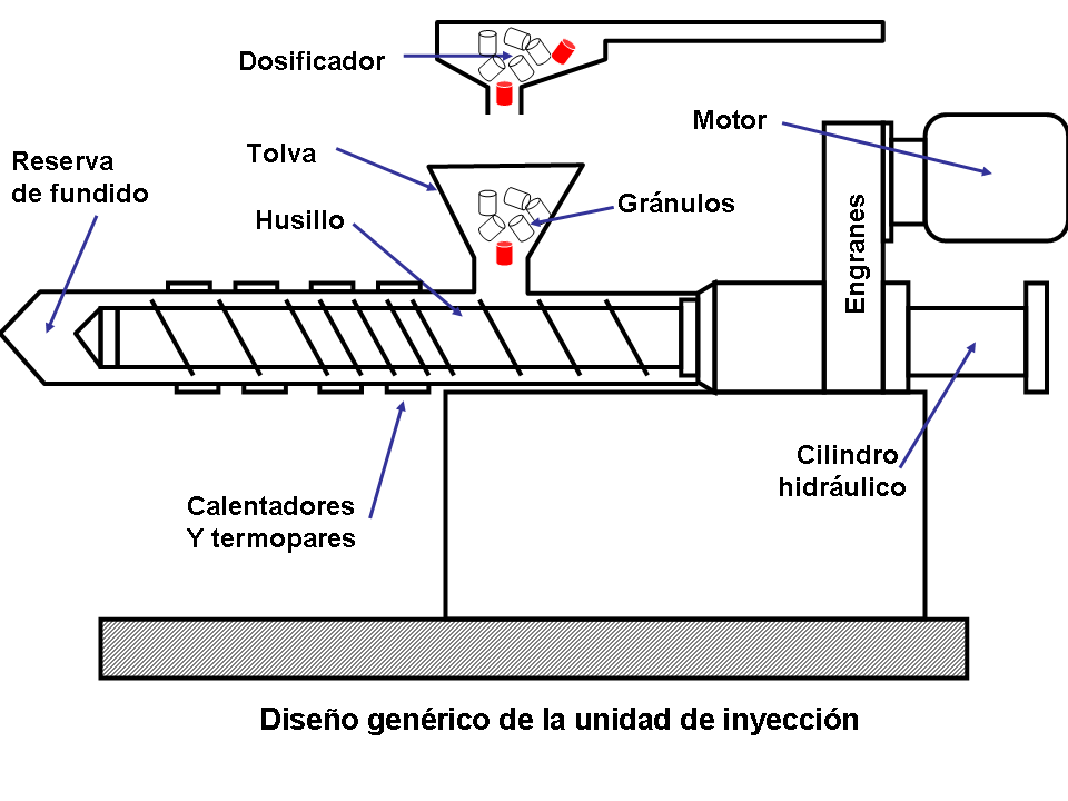 Unidad de inyección para inyectora de plástico